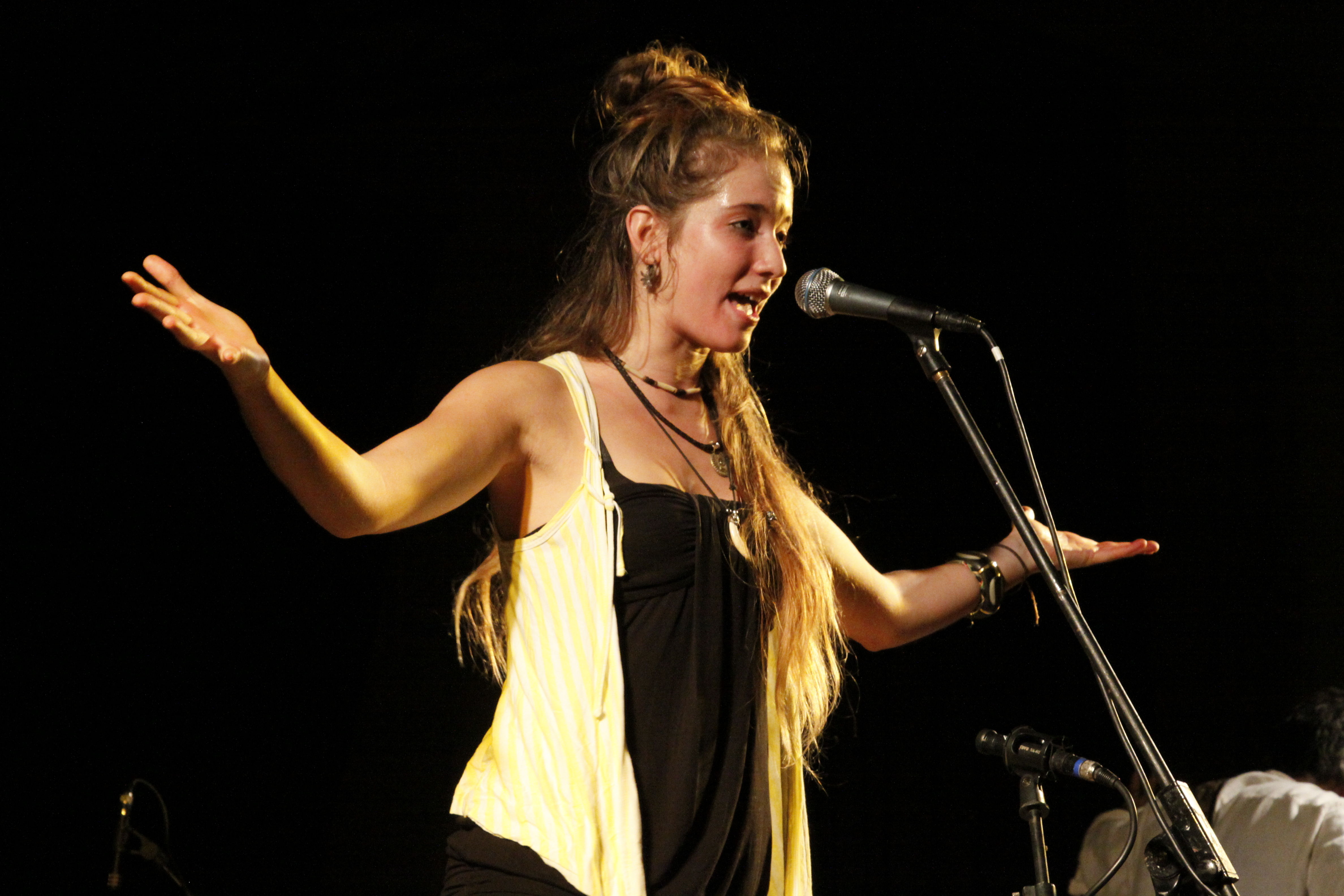 Alidé Sans - Chanteuse occitane du Val d'Aran